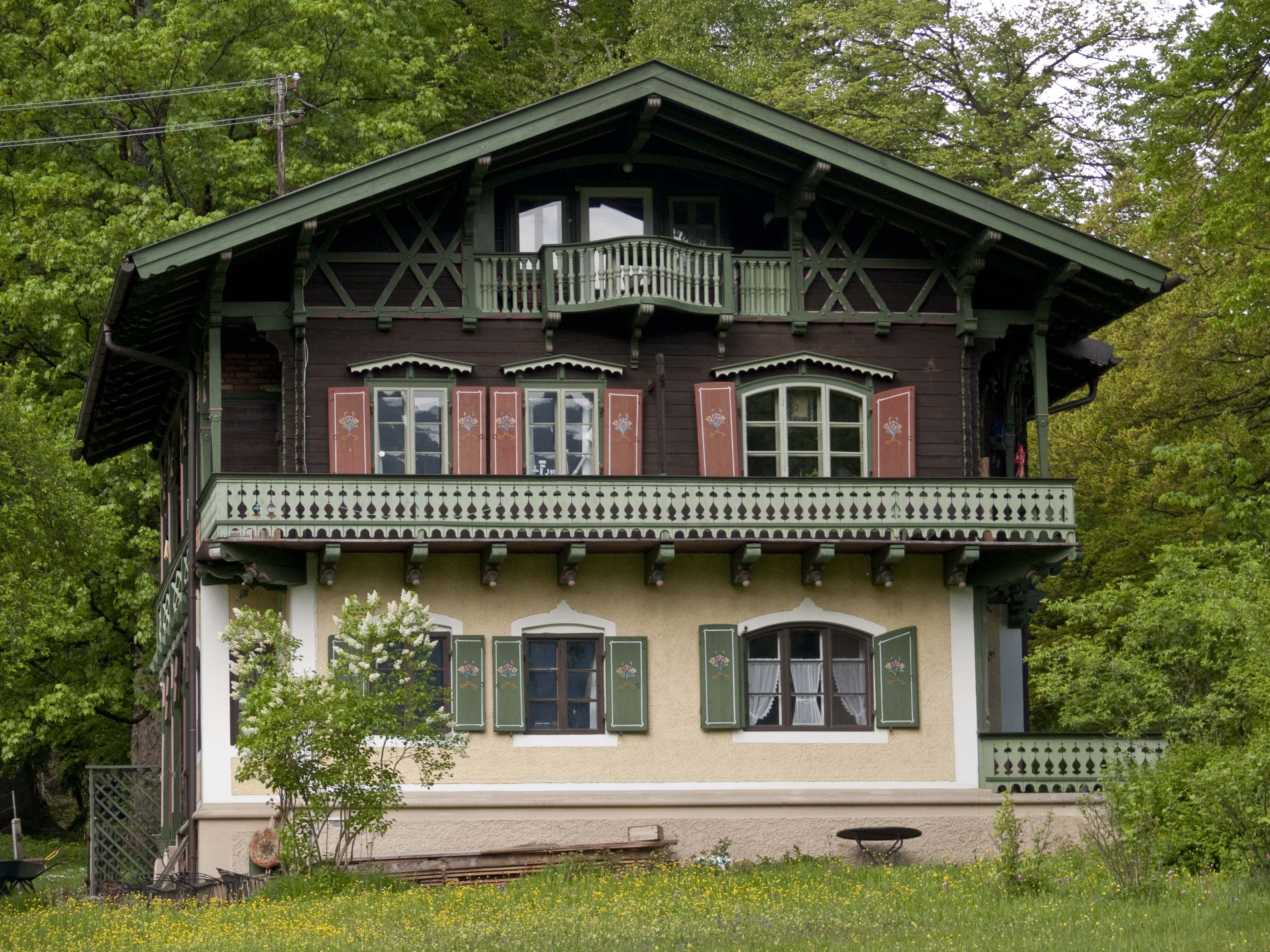 zweigeschossiger Flachsatteldachbau mit verputztem Erdgeschoss, blockbauartigem Obergeschoss, Trauf- und Giebellauben, in historistischen Formen, von Florian Edel 1905